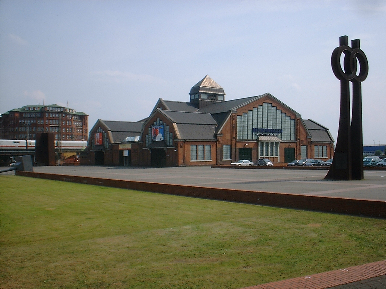 Blick auf die Südhalle mit dem Haus der Photographie This is a photograph of an architectural monument.